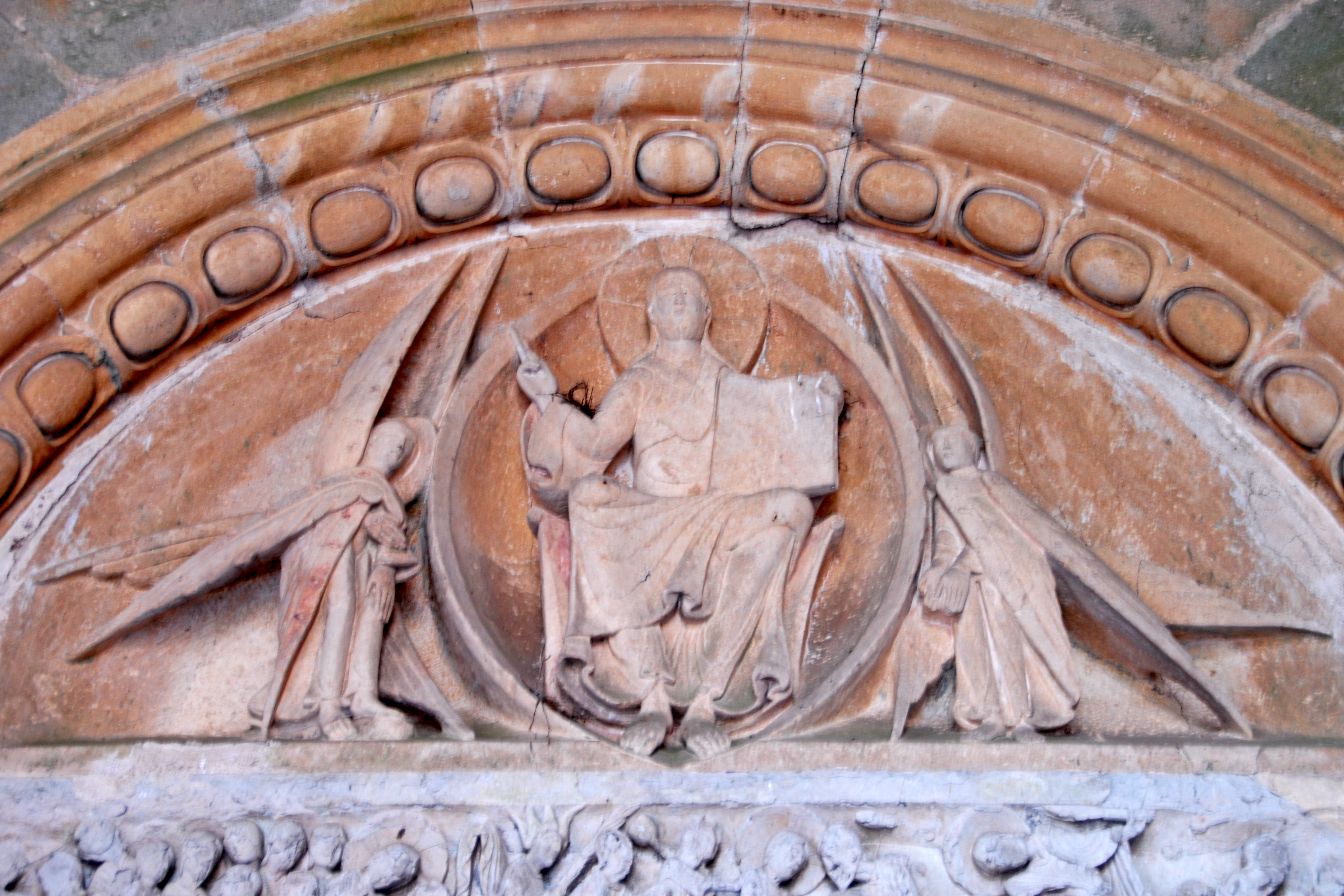 Portal, Tympanon